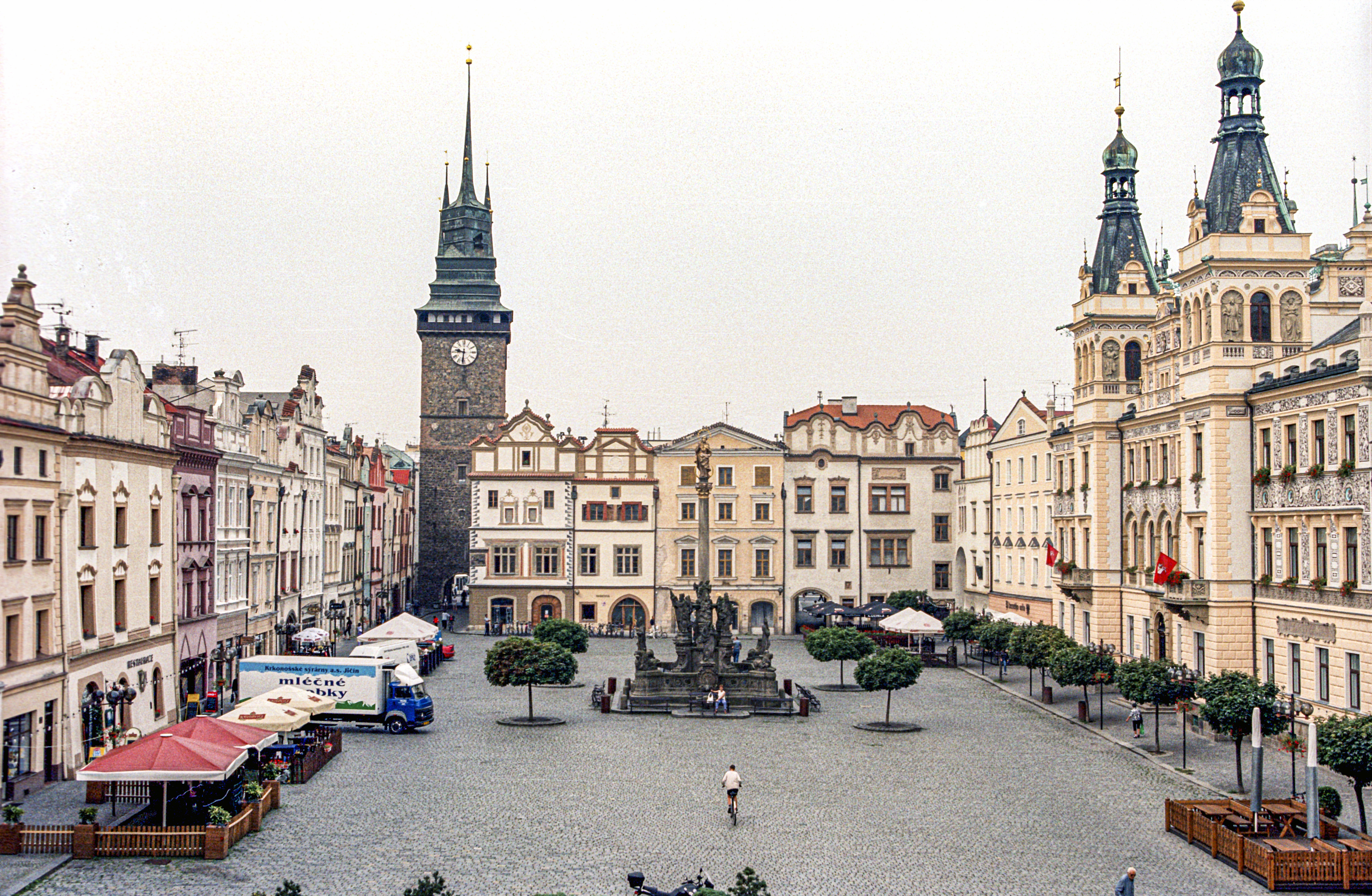 Главни трг за "Зеленим торњем" у позадини.